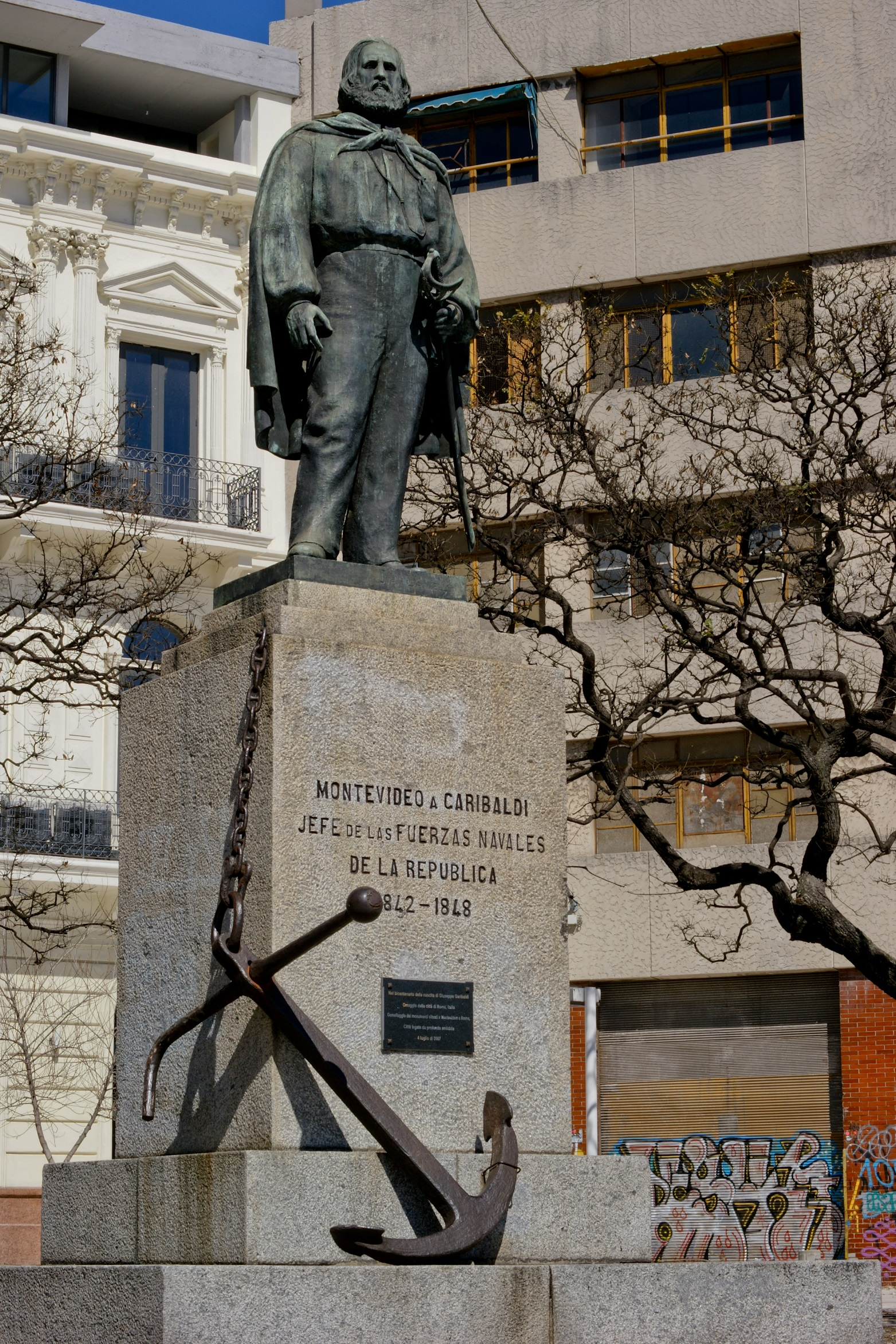 General José Garibaldi. Ubicada en el departamento de Montevideo